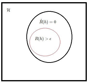 تقسیم بندی فضای فرضیه به فرضیه های سازگار